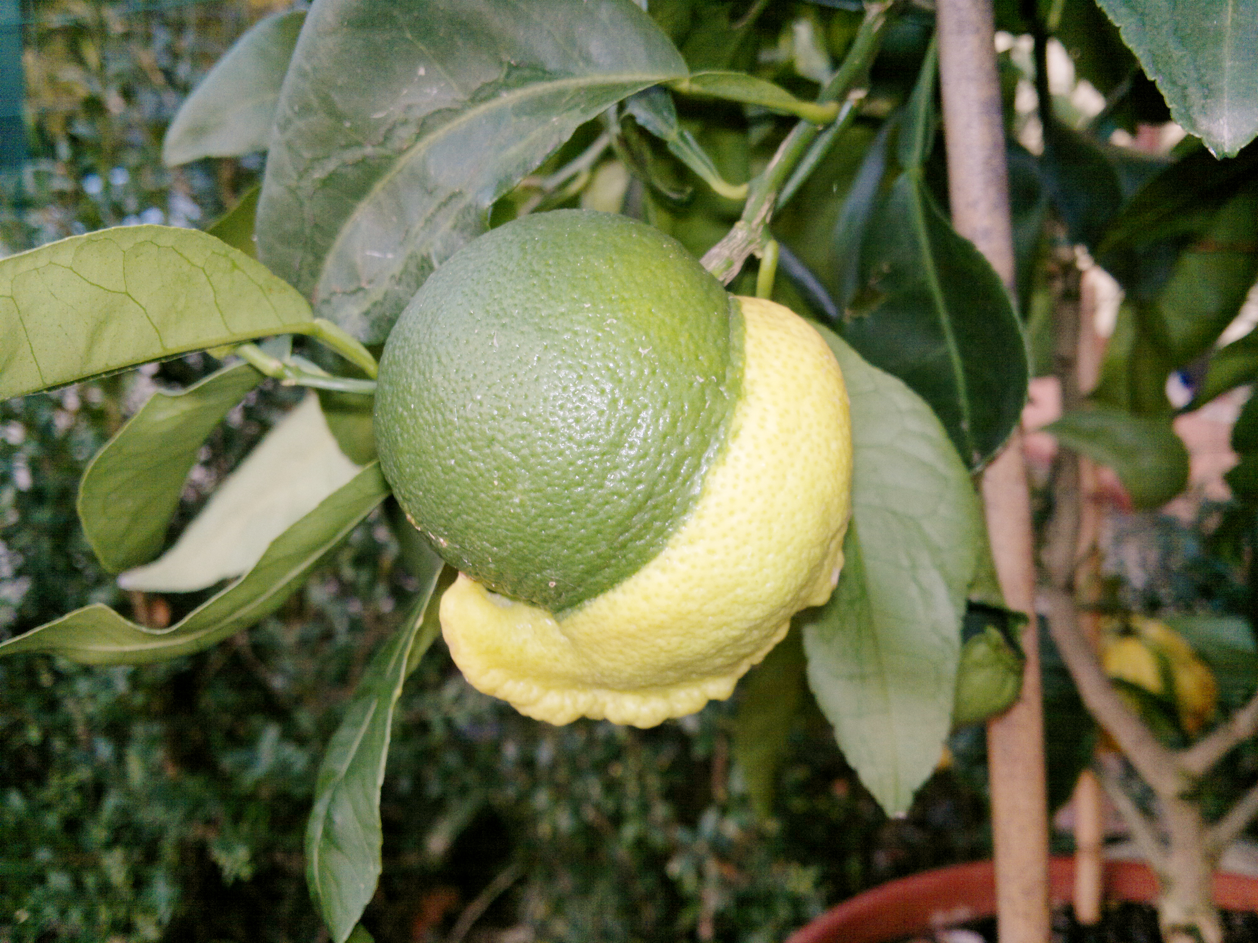 Citrus aurantium "bizzarria" frutto acerbo